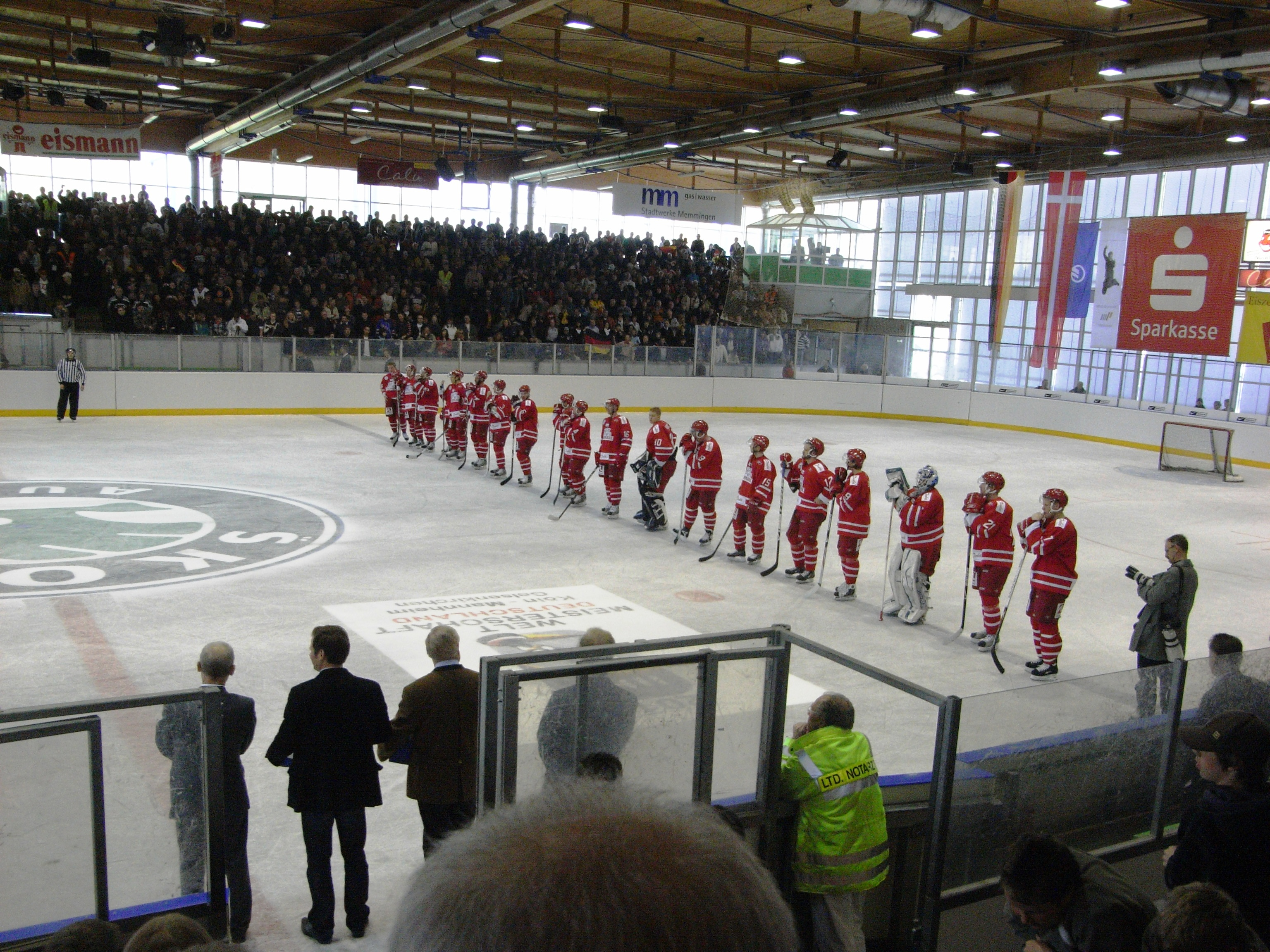 Das Vorbereitungsspiel am 18. April 2009 in Memmingen